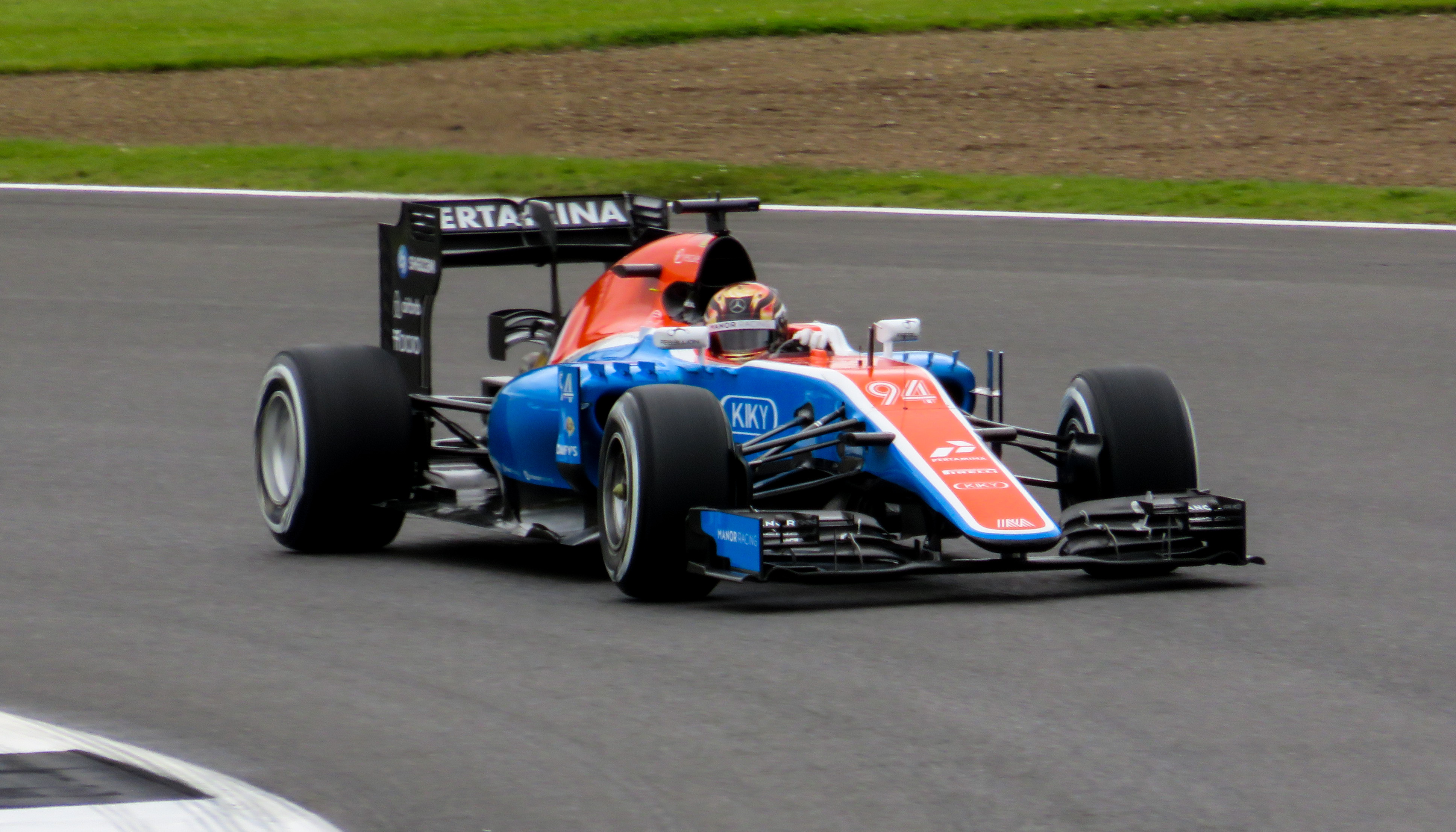 F1 - Manor F1 - Pascal Wehrlein